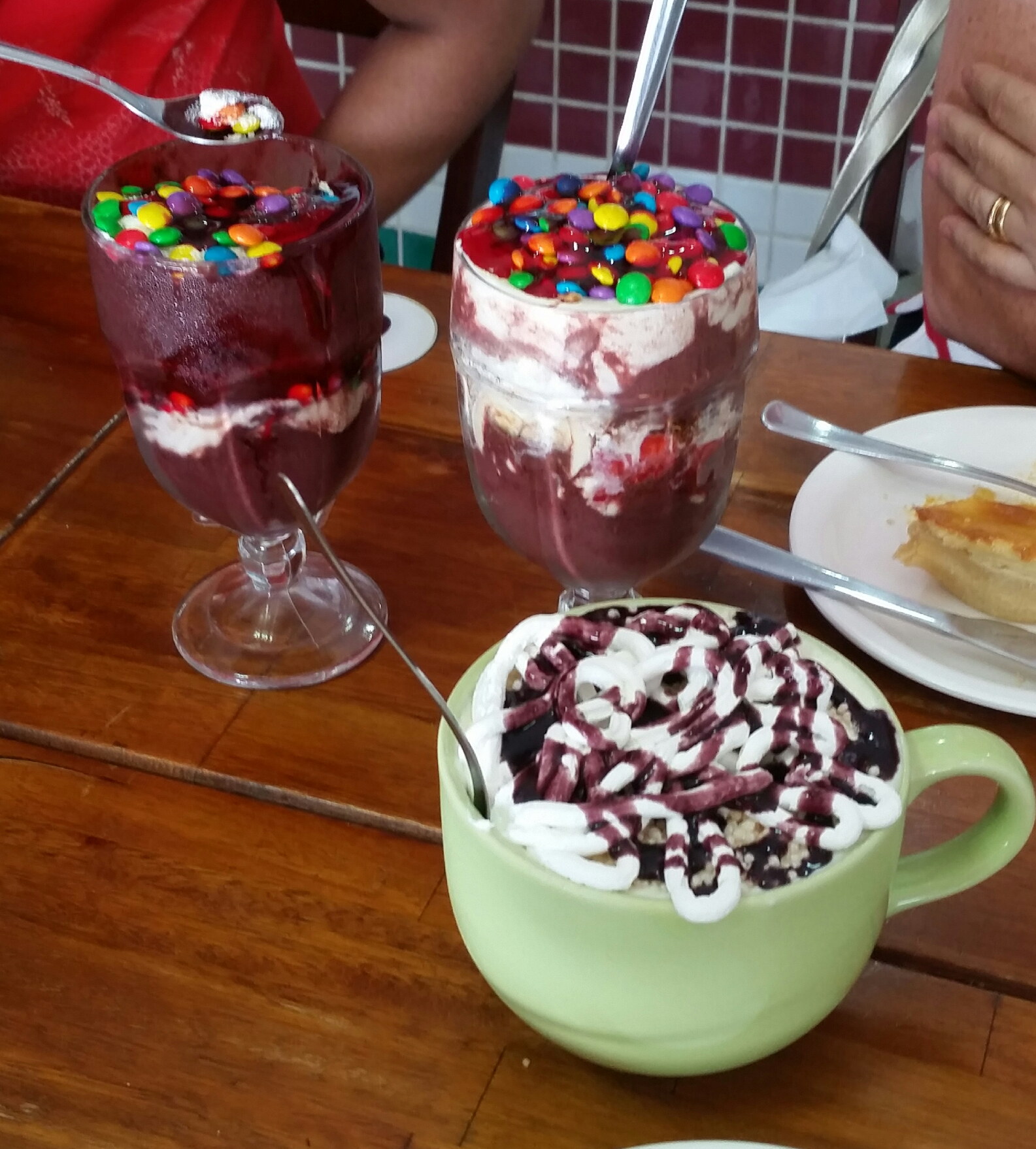 Açai como é comumente consumido na região sudeste.